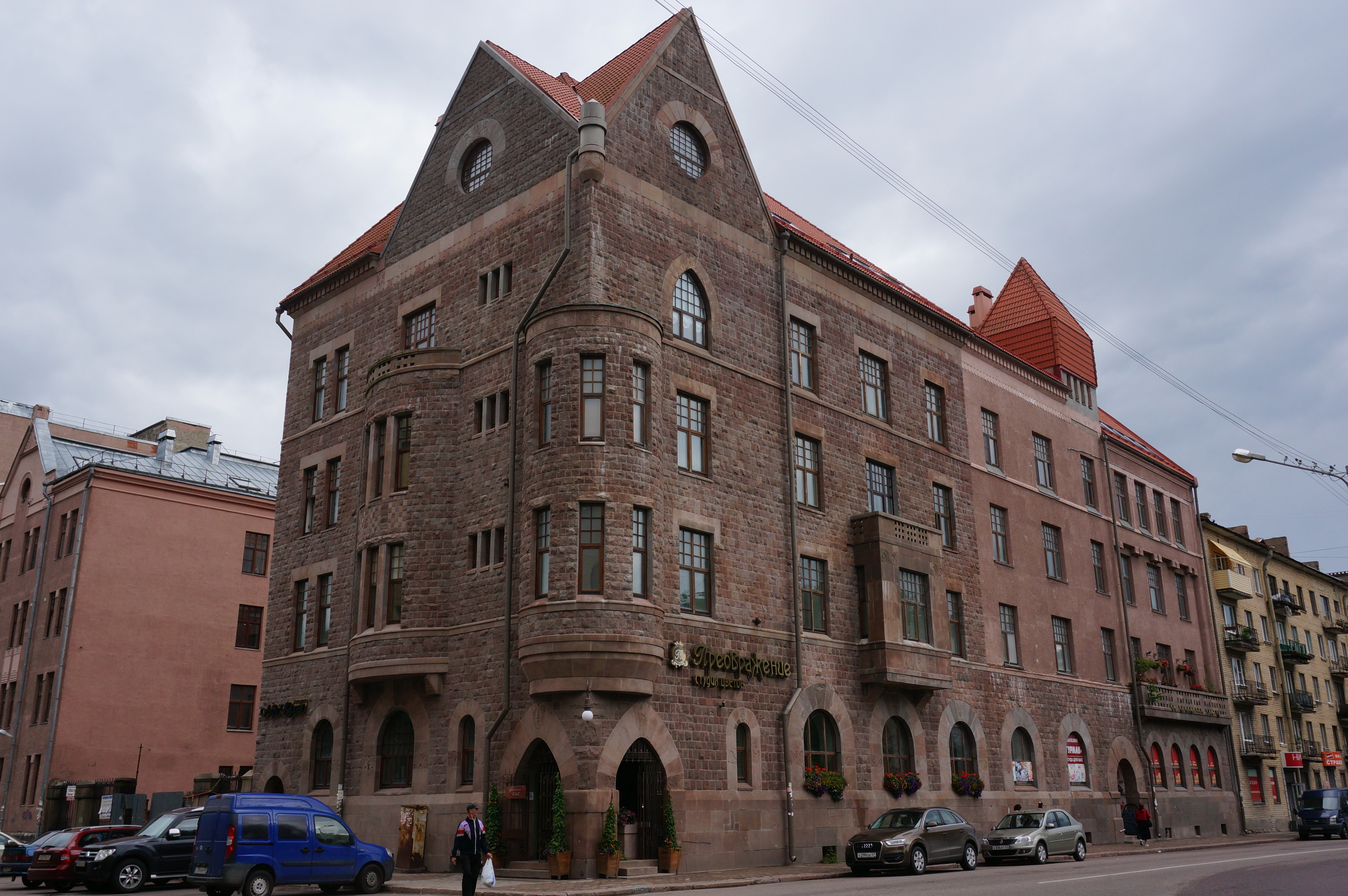 Дом акционерного общества хякли, лаллука и к (Санкт-Петербург и Лен.область, Выборг, вокзальная улица, 7)